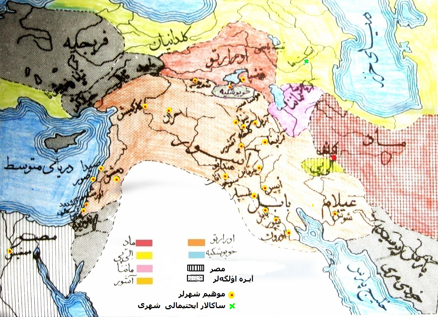 ماد و اورتا آسیا